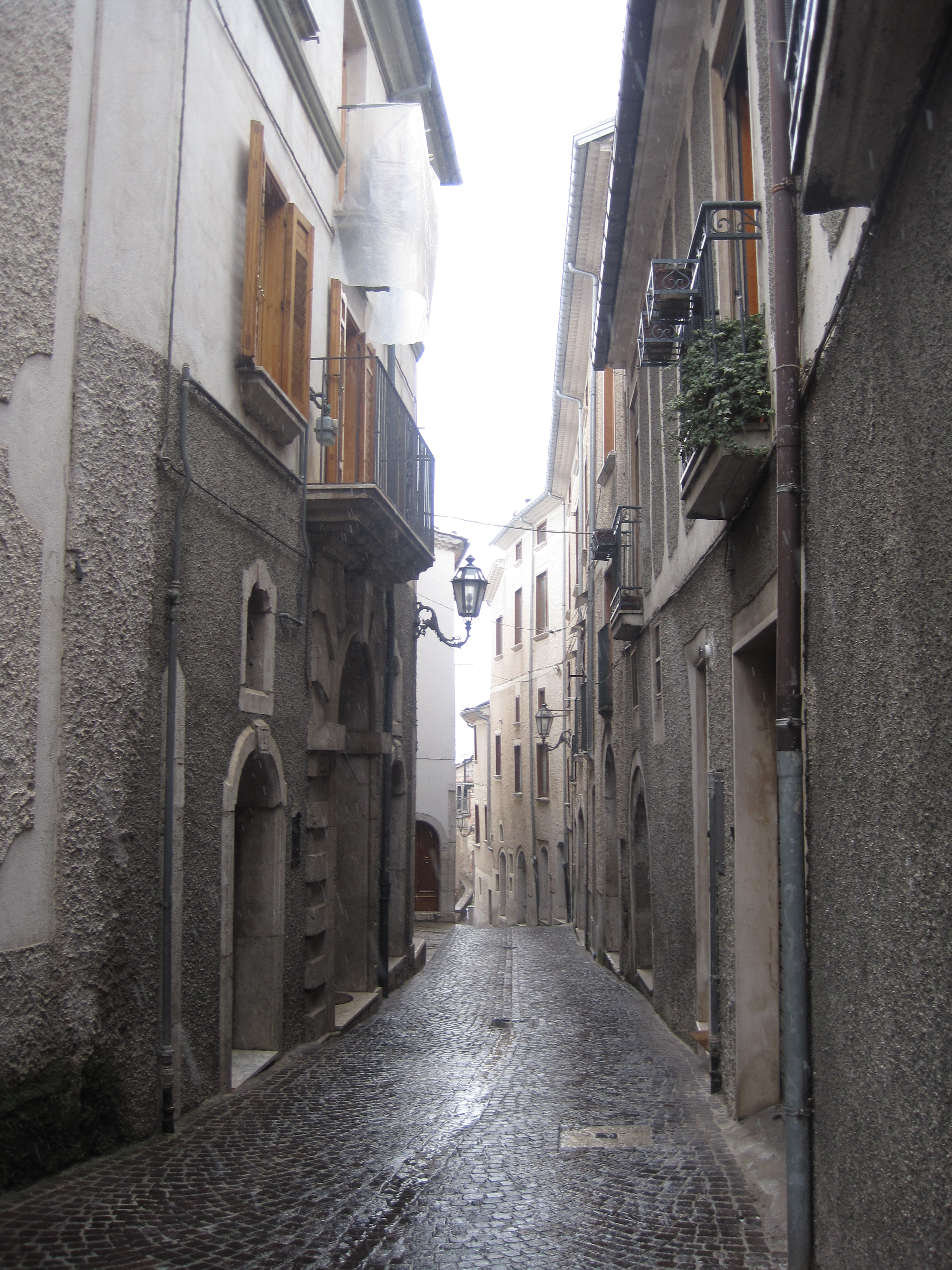 Foto scattata da me nel Gennaio scorso